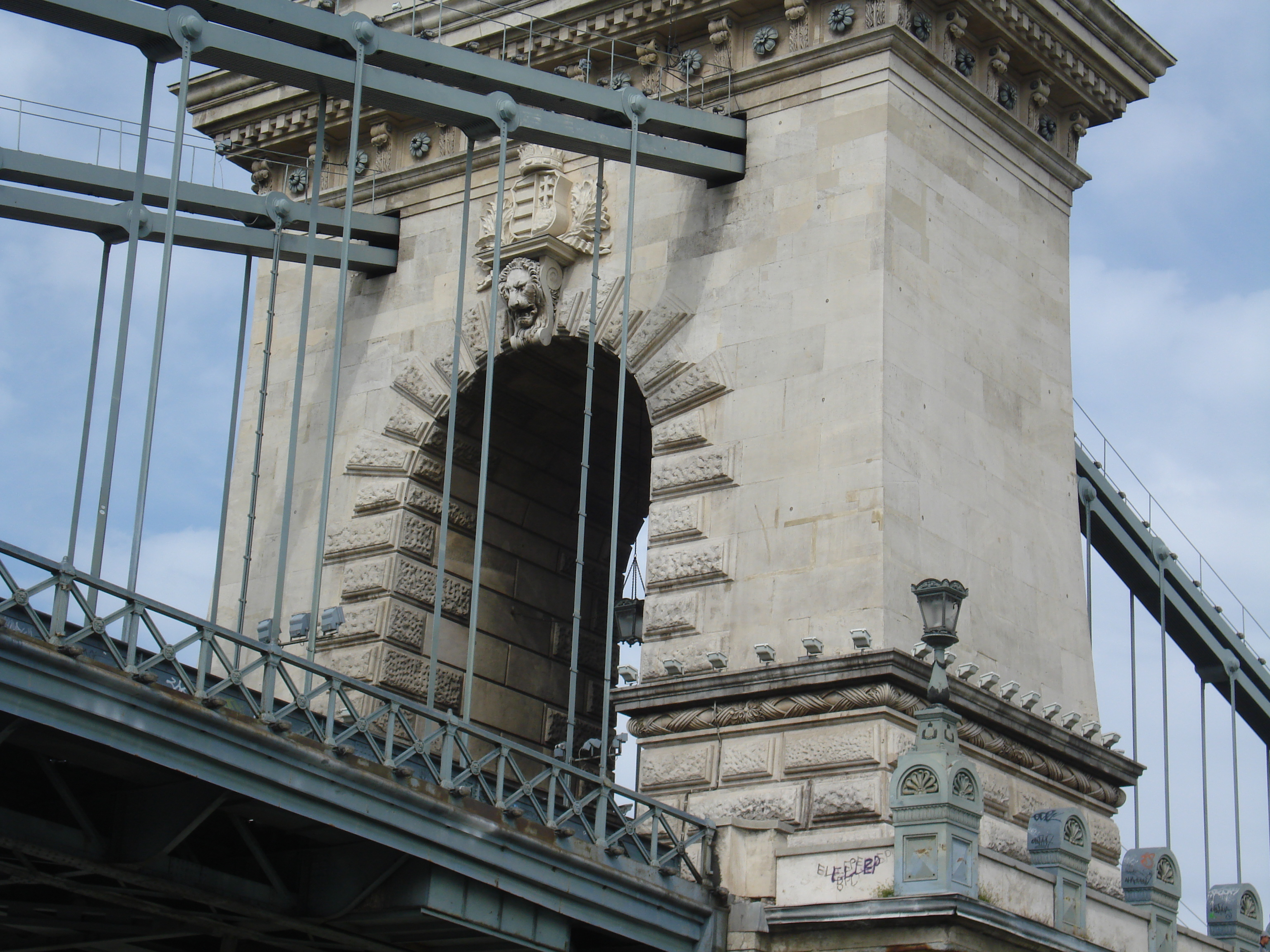 Széchenyi Lánchíd pillére a pesti oldalon